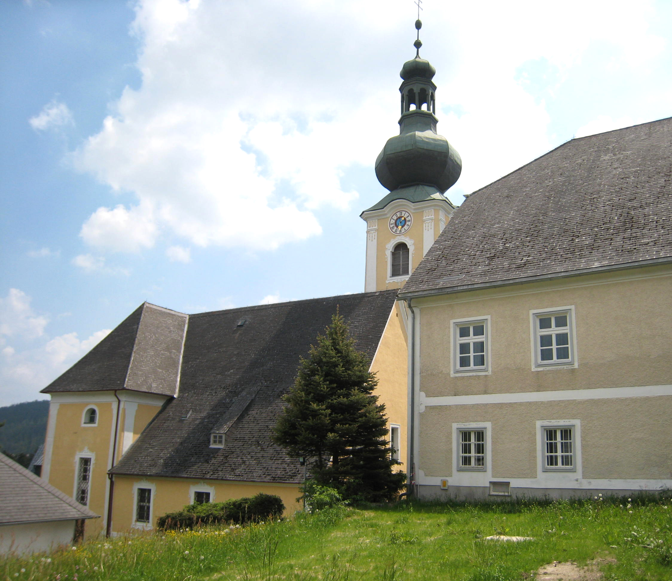 Kath. Pfarrkirche hl. Jakobus d. Ä. und Friedhof